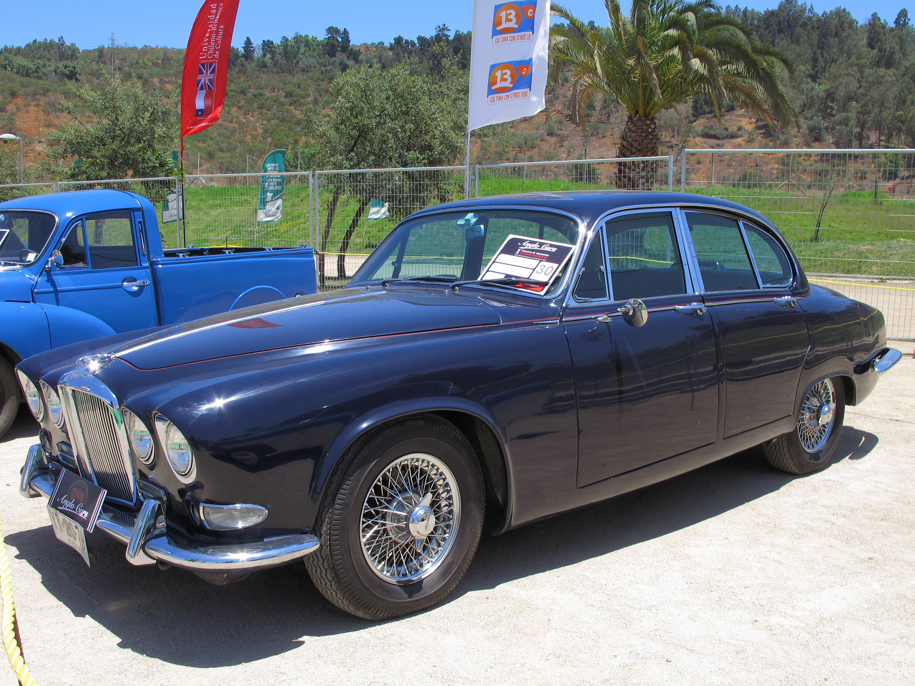 Jaguar 420 1967